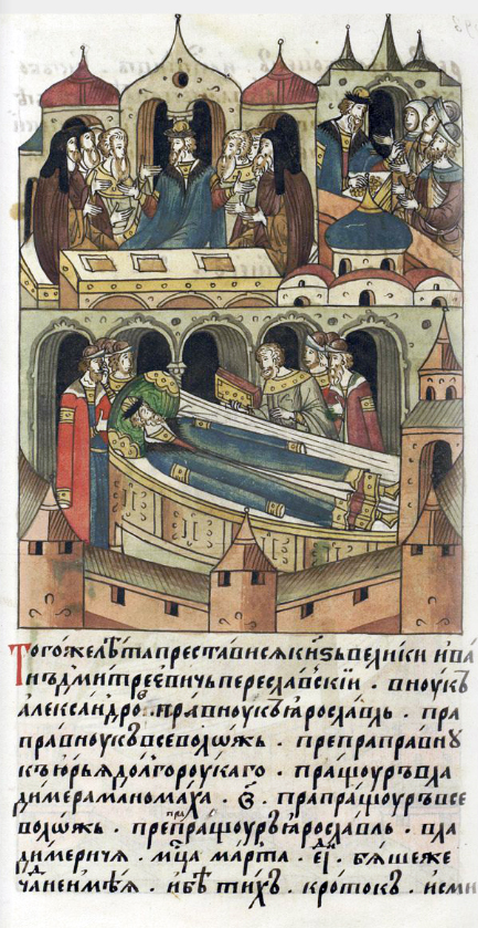 ЛИЦЕВОЙ ЛЕТОПИСНЫЙ СВОД В том же году преставился князь великий Иван Дмитриевич Переславский, внук Александров, правнук Ярославов, праправнук Всеволодов, препраправнук Юрия Долгорукого, (потомок) пращура Владимира Манамаха, прапращура Всеволода, пре[пра]пращура Ярослава Владимировича, месяца марта в 15-й день. Детей же не имел и был тих, кроток, и смирен, [и любовен, и милостив, и к божественным церквам прилежен очень, и премного почитал священнический чин и иноческий, и любил (их), и беседовал с ними непрестанно, и к нищим, и к странникам словно отец был, и настолько был добродетелен, что многие дивились житию его.]